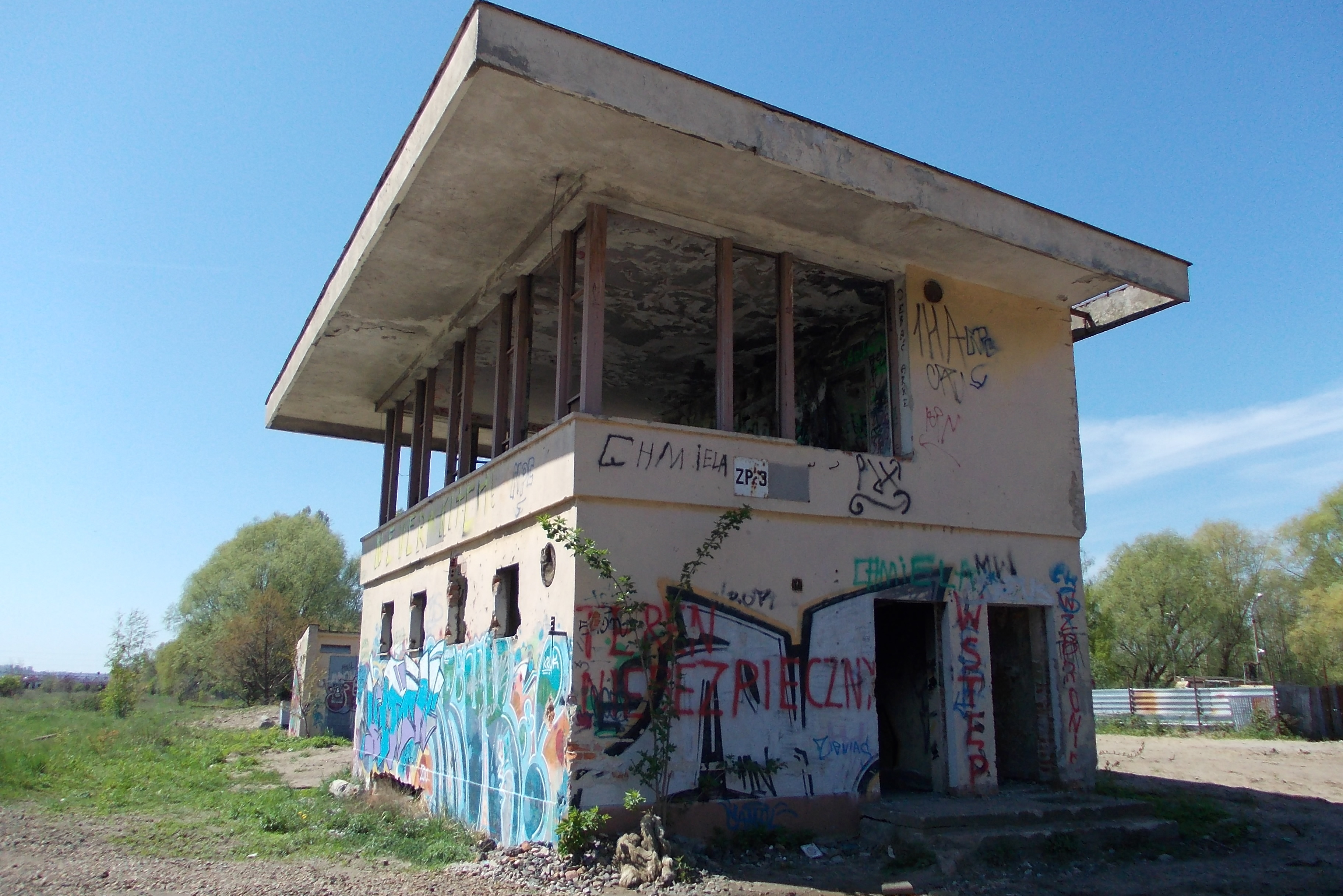 nastawnia ZP3 Gdańsk Zaspa Towarowa